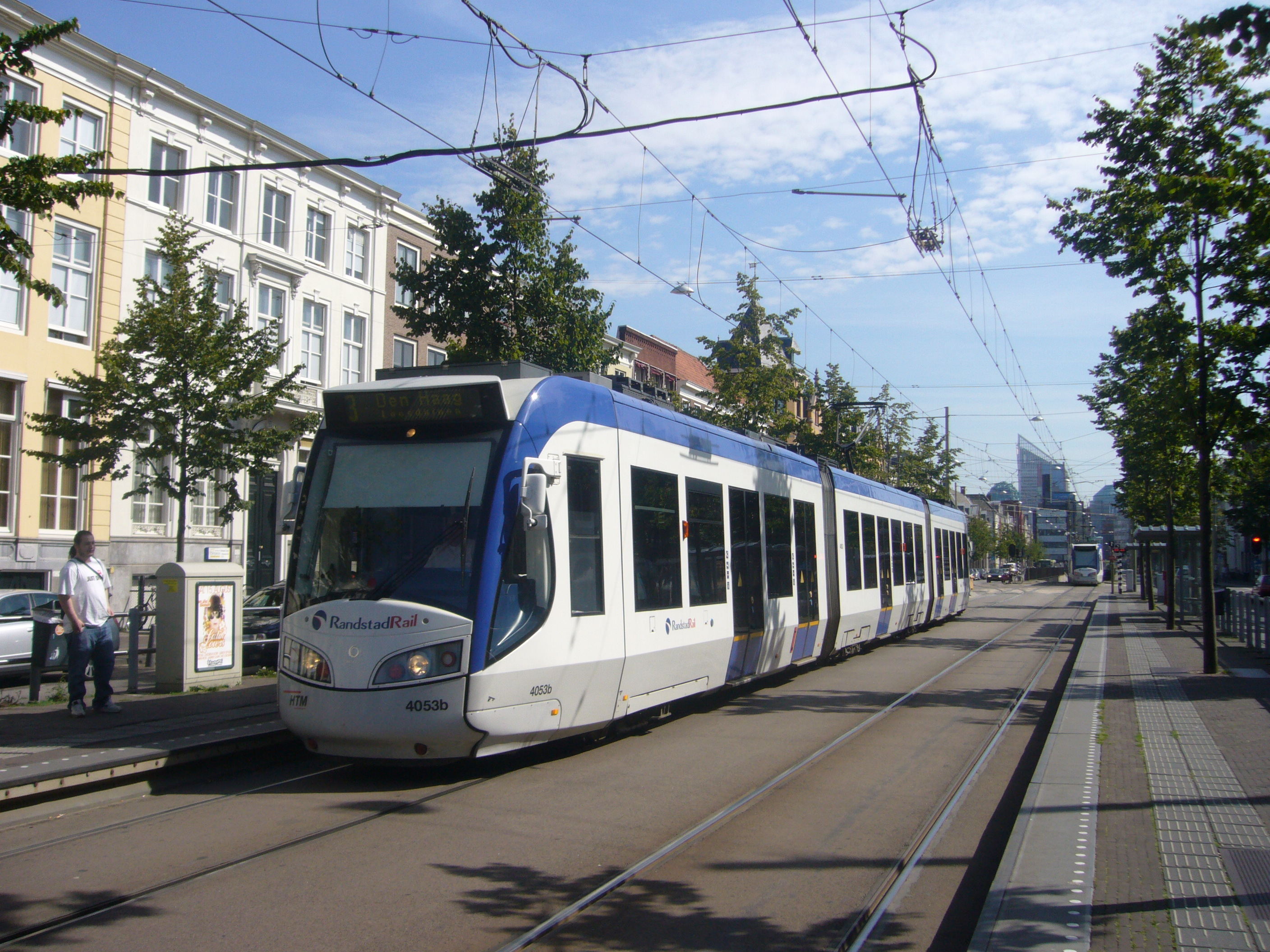 Prinsegracht Den Haag, Randstadrail